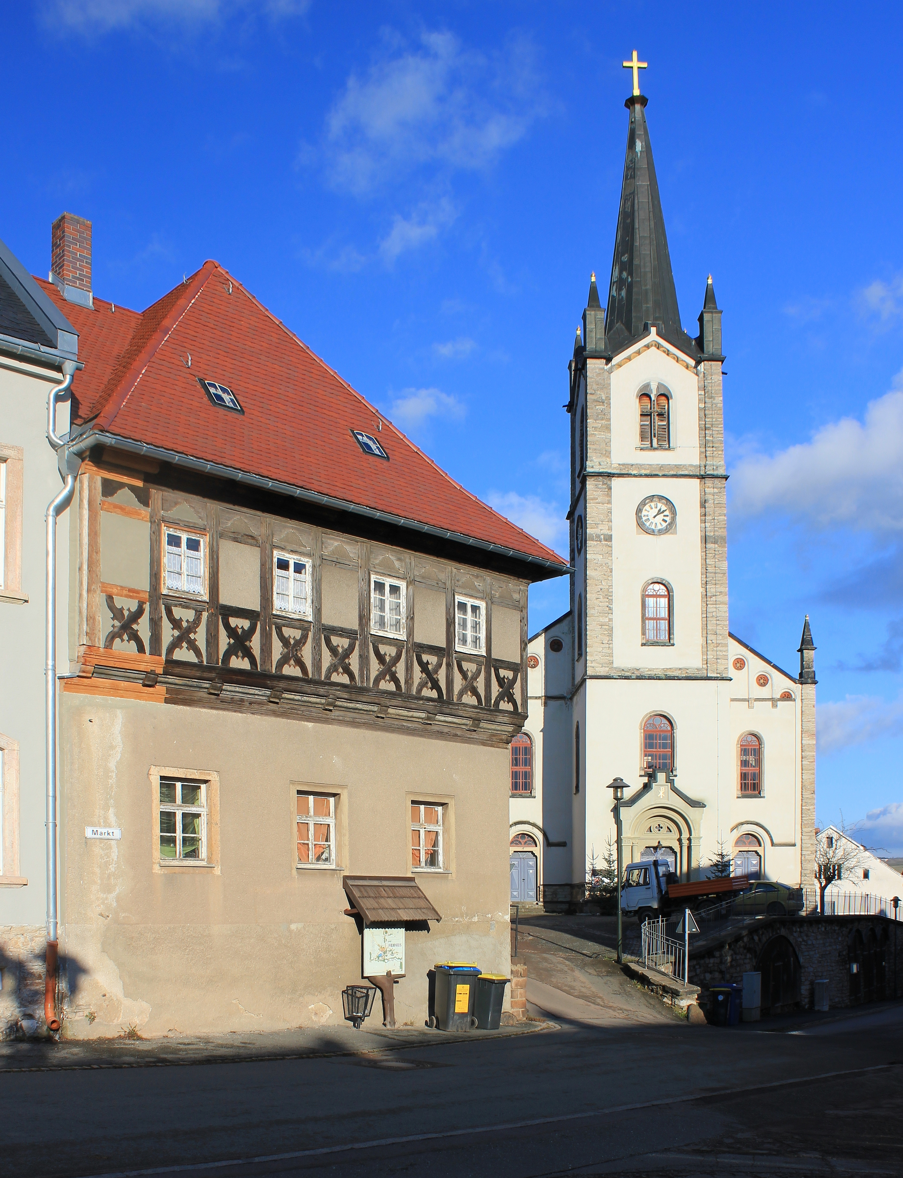 Am Marktplatz in Wildenfels. Sachsen.